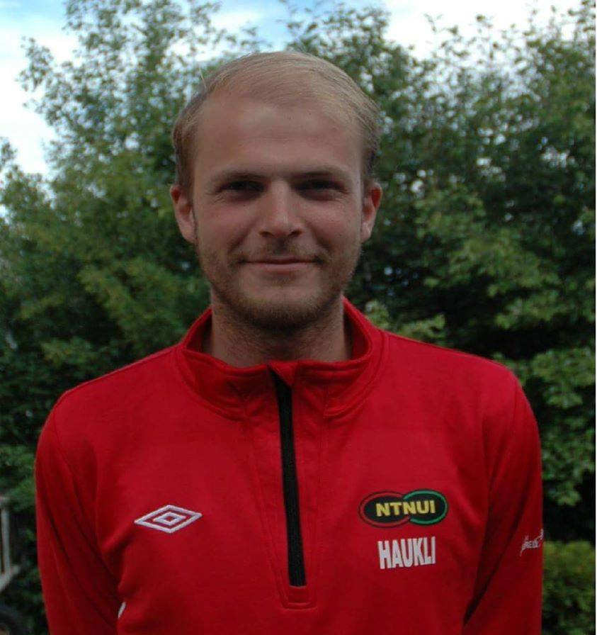 Jon Stian Haukli